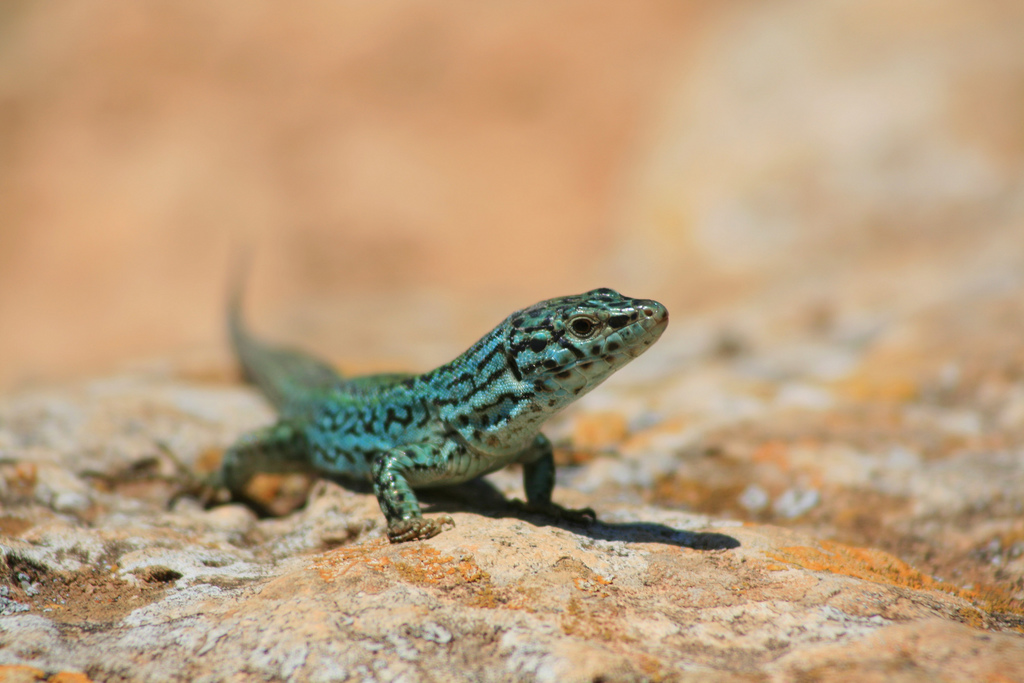 Formentera XIX